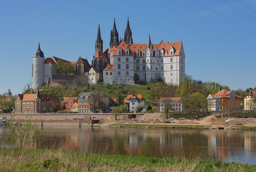 Der Burgberg über Meißen von der Elbe aus gesehen